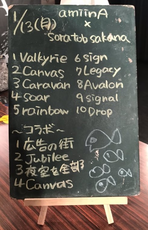 amiinAセトリボード